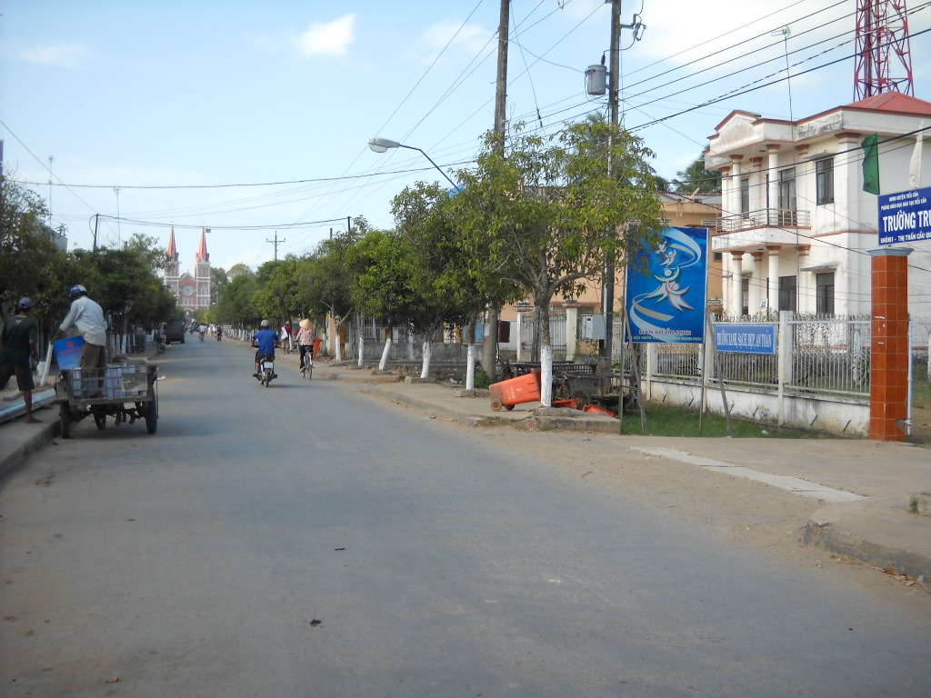 Thể loại:Xã Thể loại:Thị trấn Việt Nam